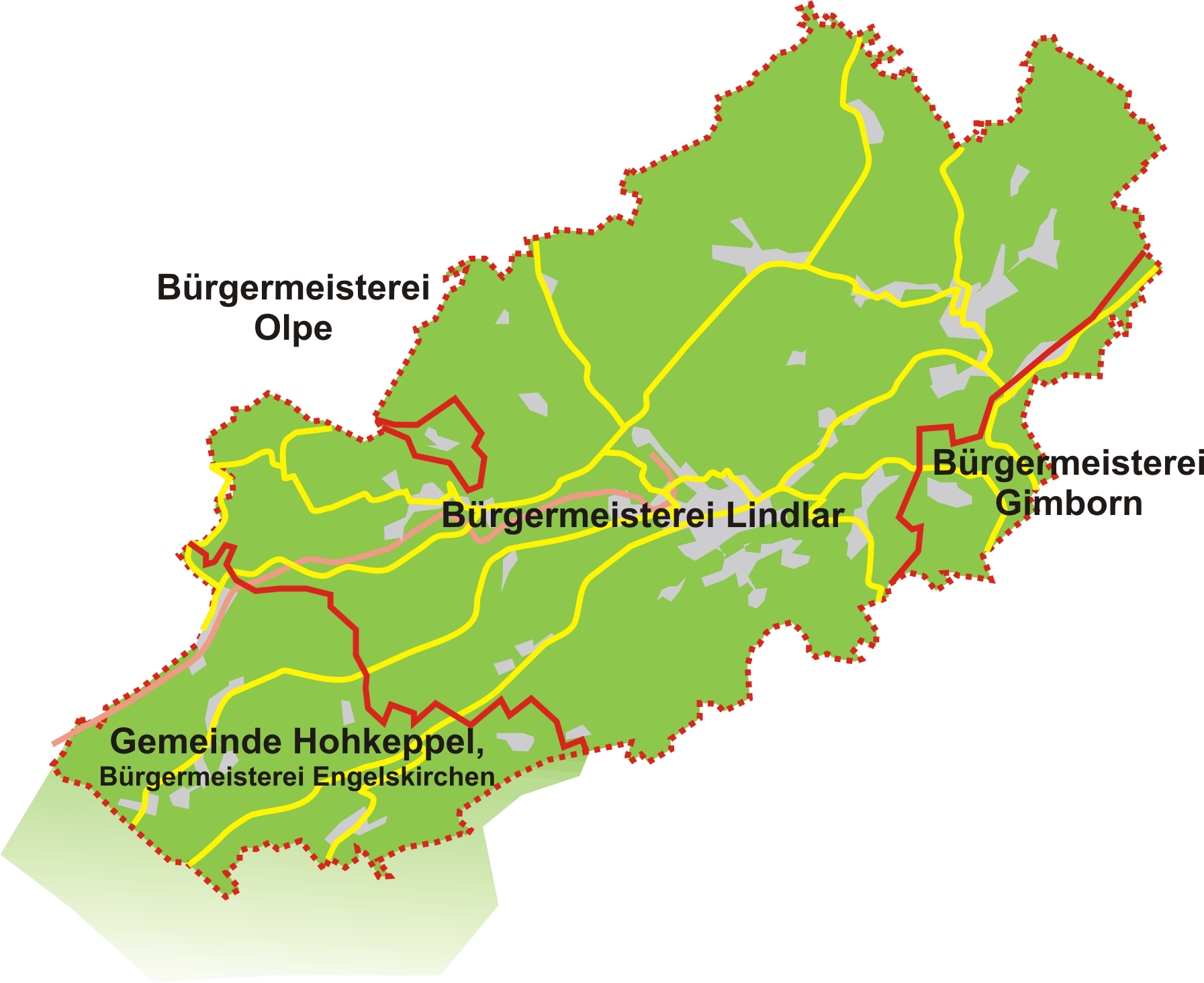 Karte der heutigen Gemeinde Lindlar, ergänzend mit den bis 1974 geltenden Kommunalgrenzen versehen.